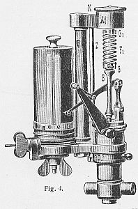 Indikator, Bild aus Luegers um 1890